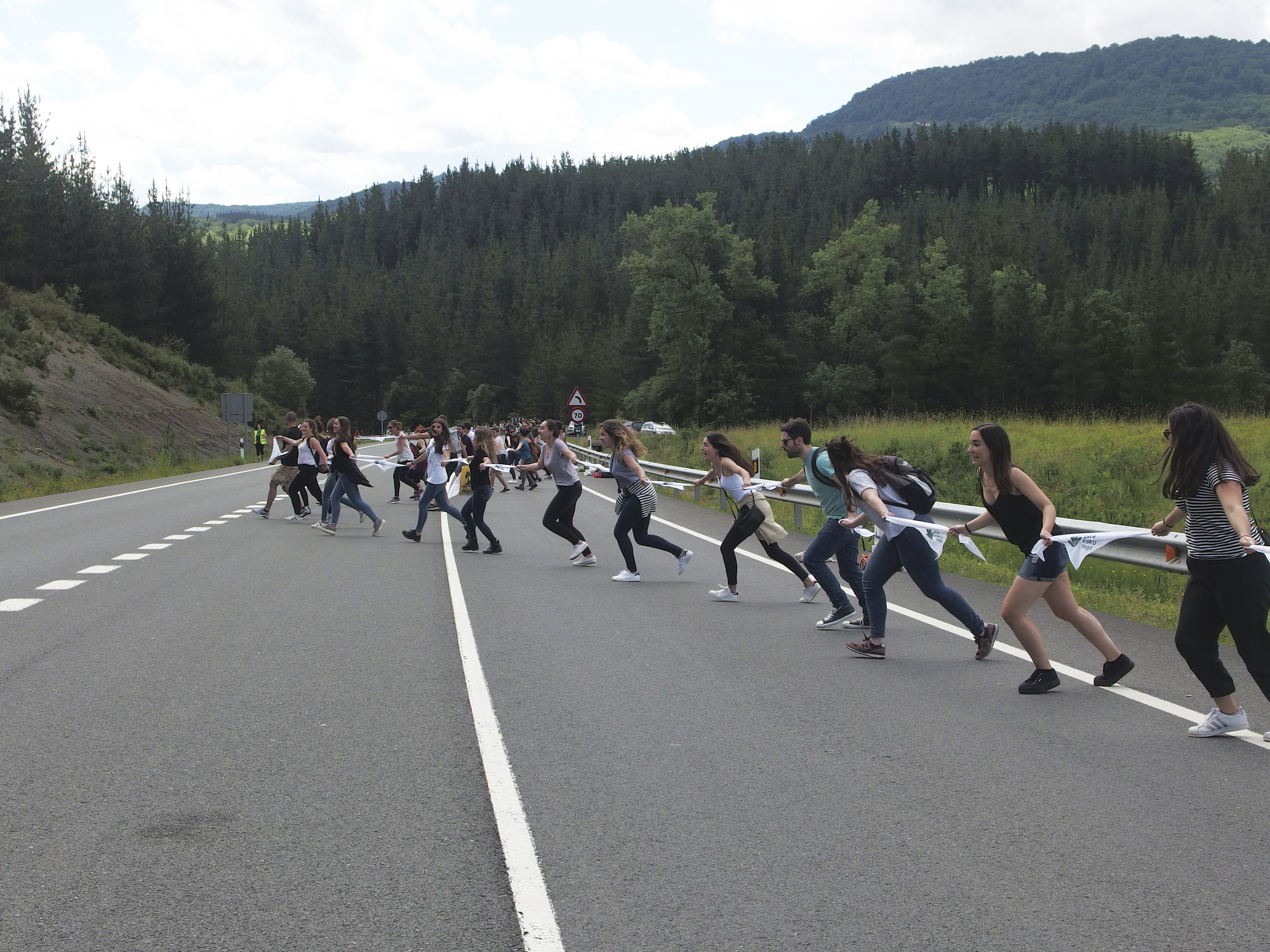 Getxoko Gazte KM 163-165